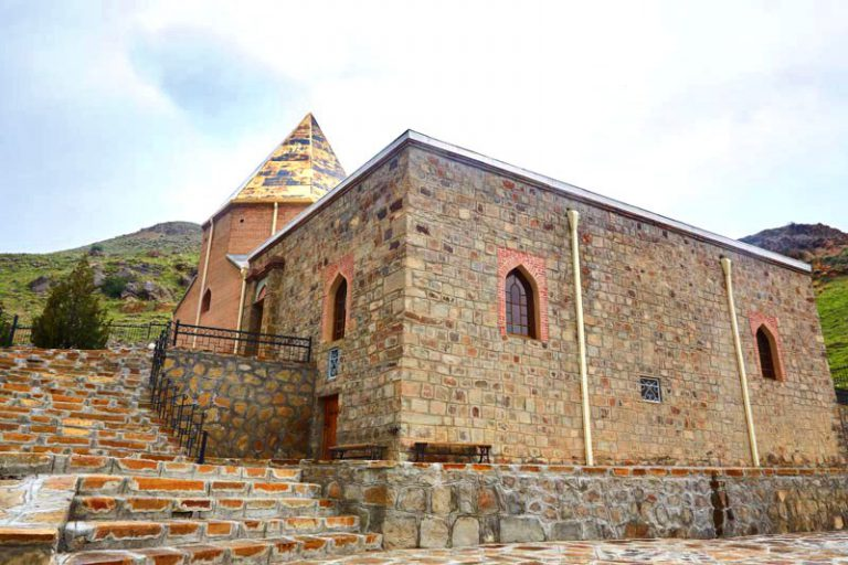 Əlincəçay xanəgahı Culfa Xanəgah